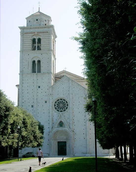 Fermo; Duomo